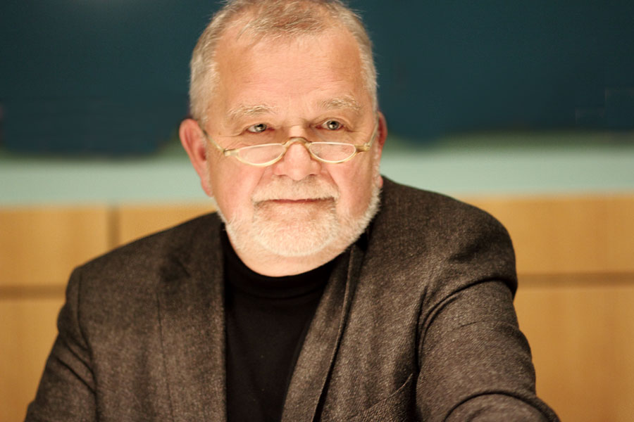 Rüdiger Safranski, Düsseldorf Kunstsammlung Nordrhein-Westfalen, 05.Dezember 2013. Lesung aus "Goethe - Kunstwerk Des Lebens"